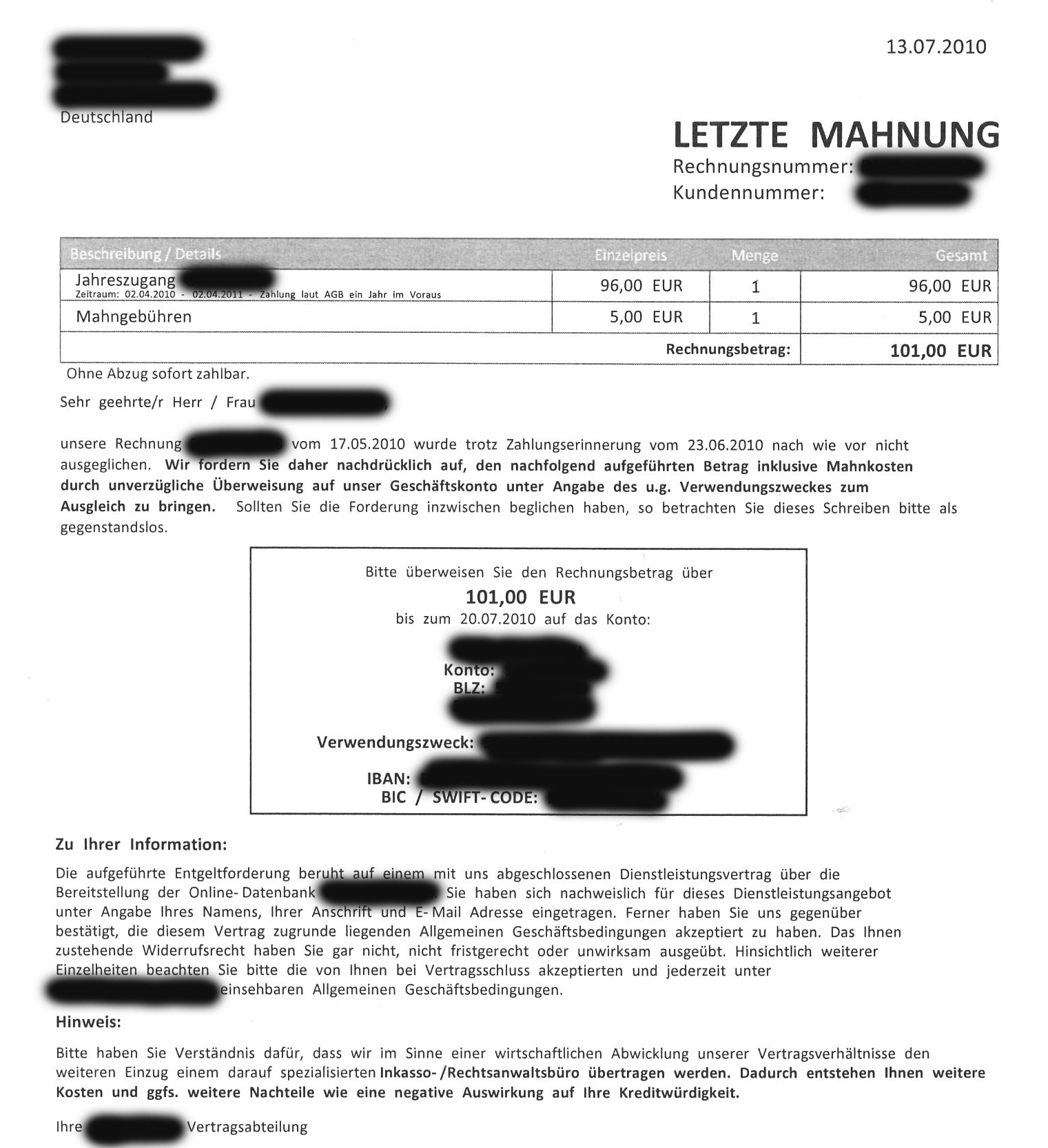 Beispiel eines typischen Mahnschreibens im Rahmen einer Internetabofalle (persönliche Angaben geschwärzt)